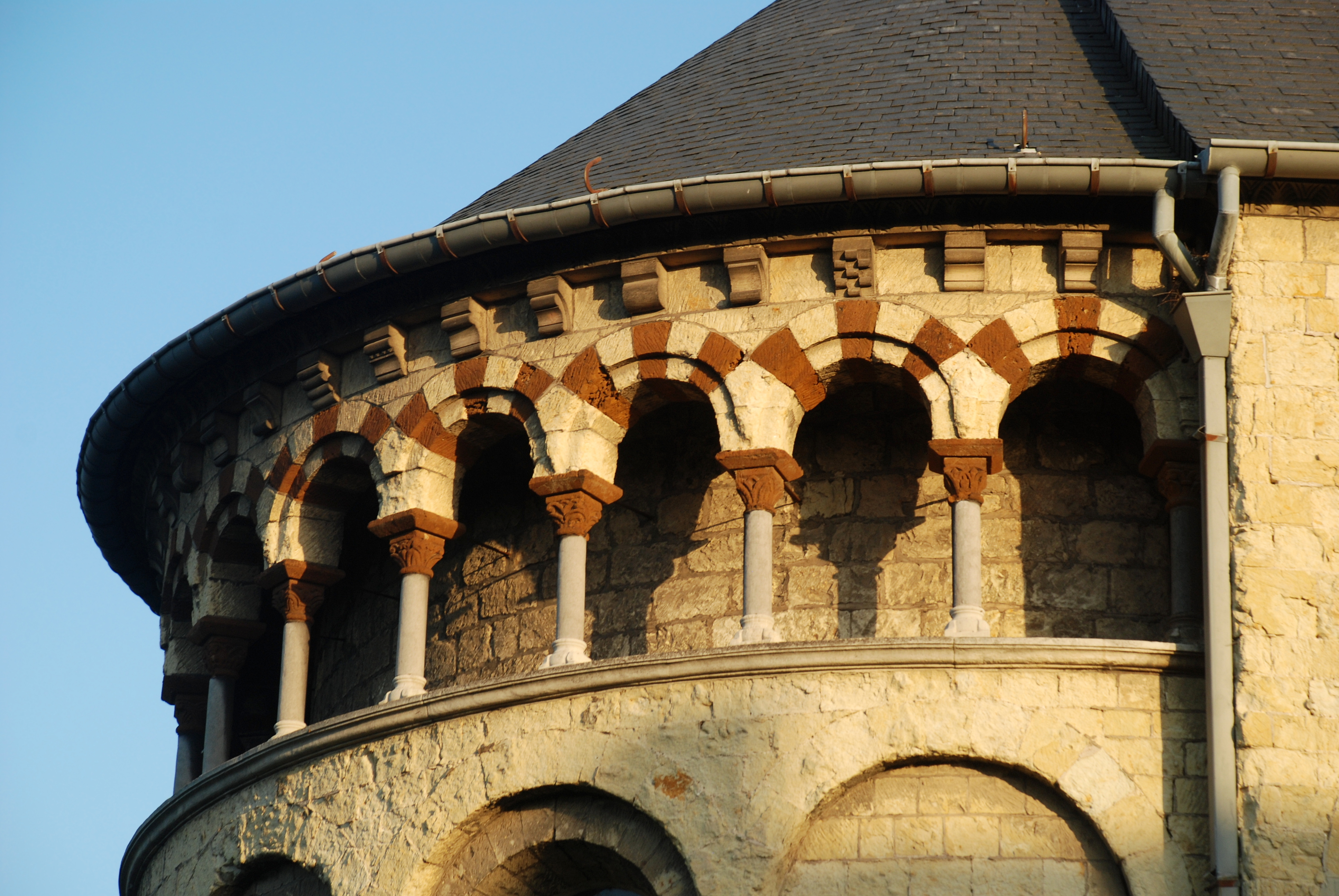 Belgique - Province de Limbourg - Église Saint-Pierre de Saint-Trond